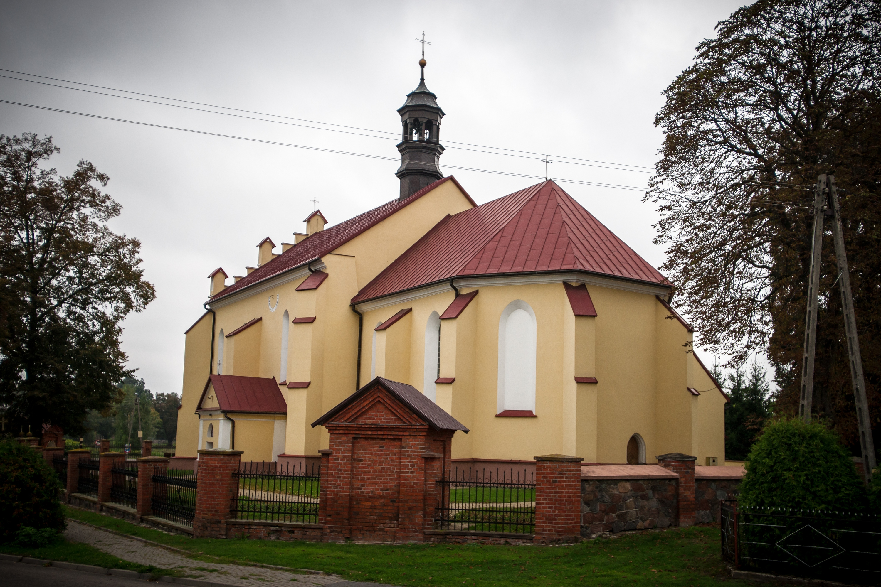 Potok Wielki, kościół par. p.w. św. Mikołaja, kon. XV, XIX/XX